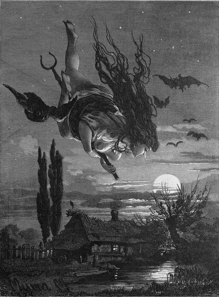 Ведьма. "Живописная Россия", том 5, 1897.